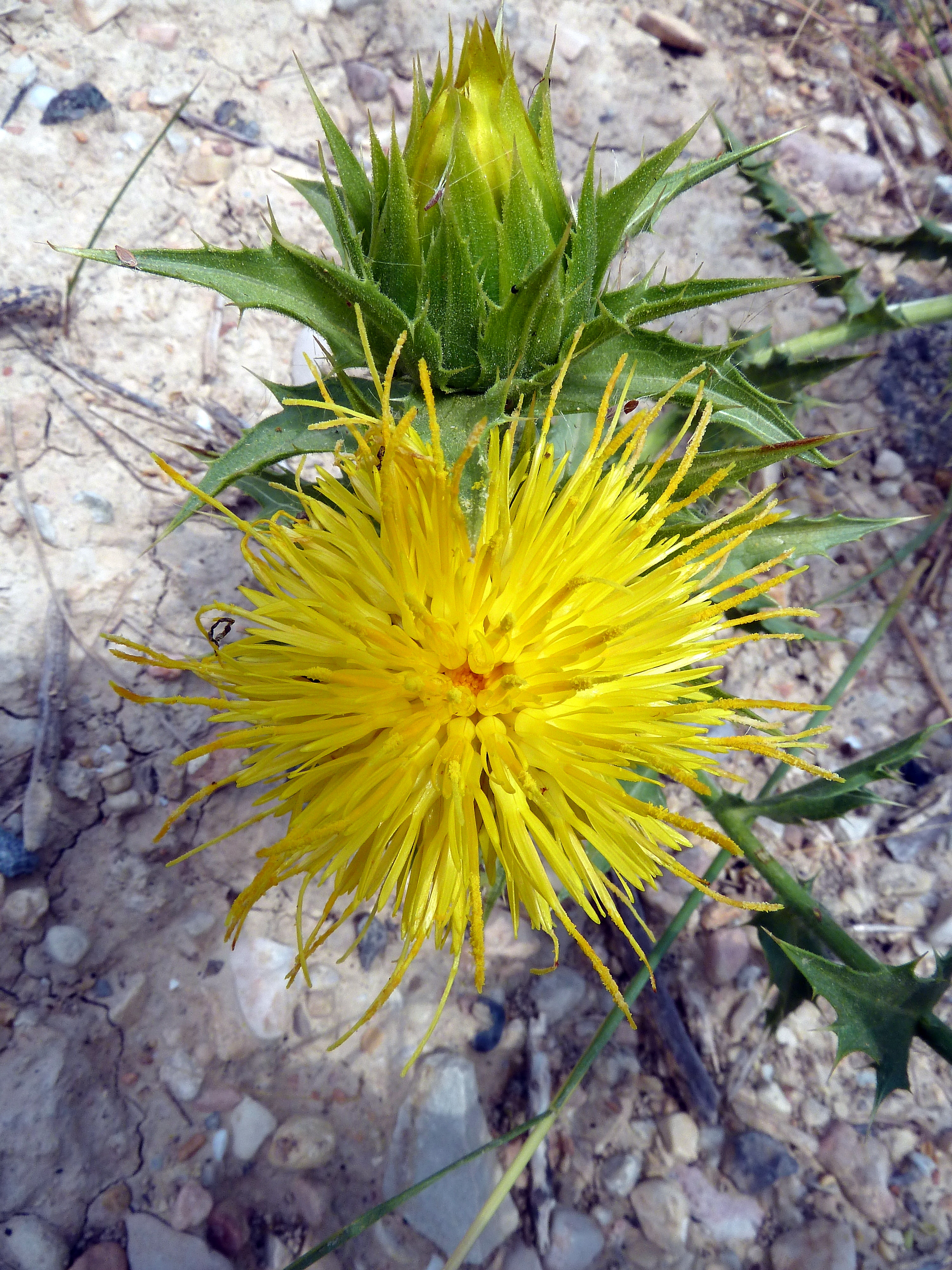 Carthamus arborescens : Inflorescencia y capítulo en preantesis - Camino de la Azarbe de Patricio, Albatera (Alicante, España)